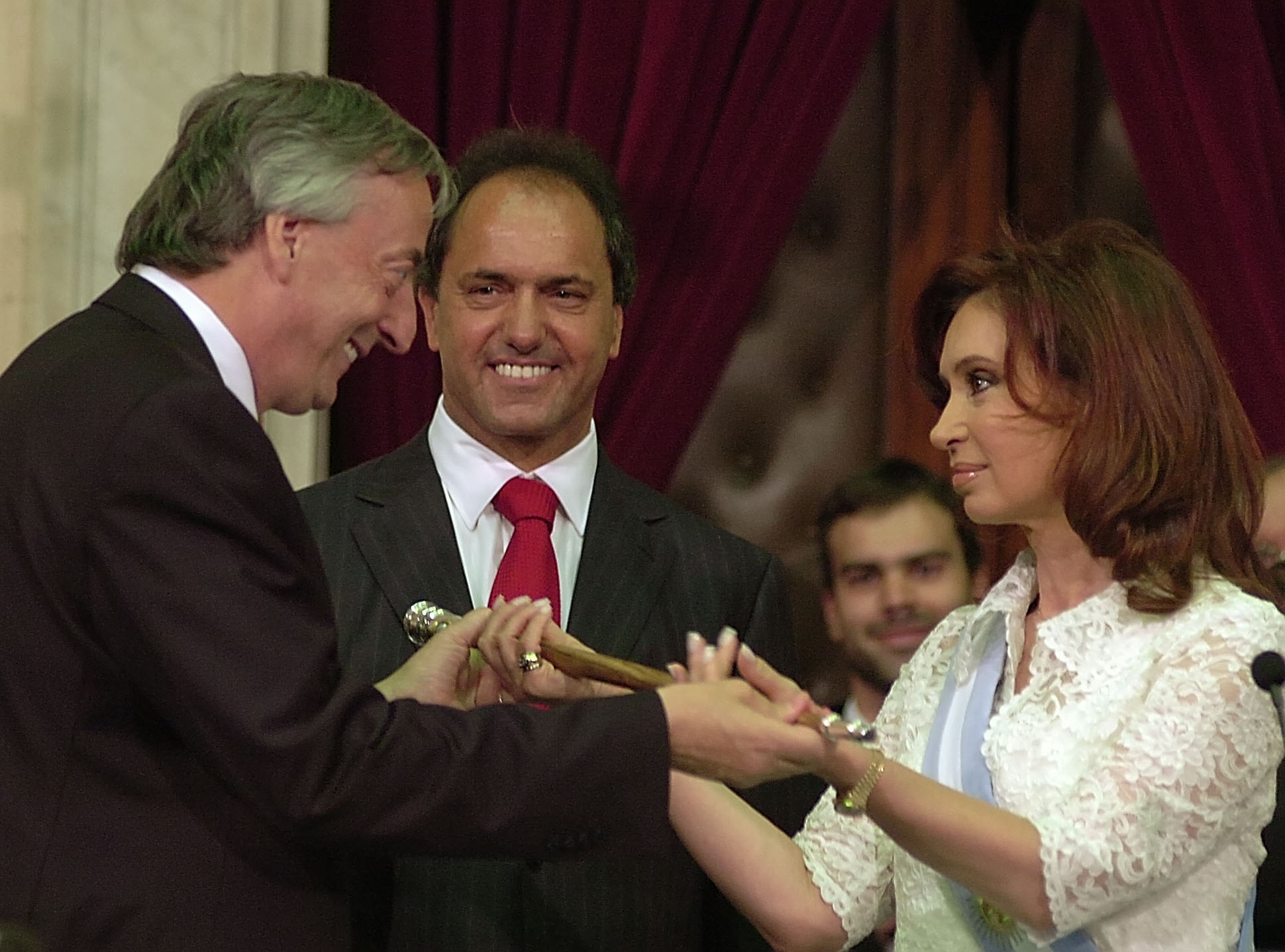 La Presidenta de la Nación Argentina, Cristina Fernández de Kirchner junto a su esposo Néstor Carlos Kirchner.